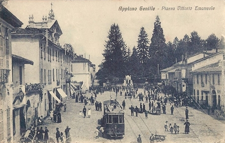 Appiano Gentile, piazza Vittorio Emanuele